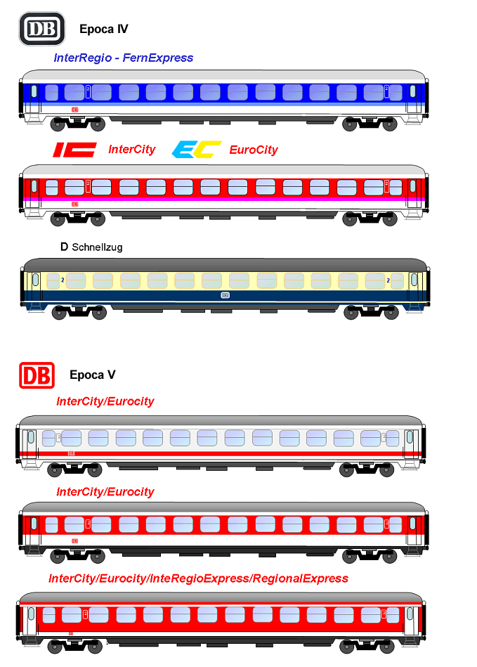 Livree DB autore Marco Lambruschi